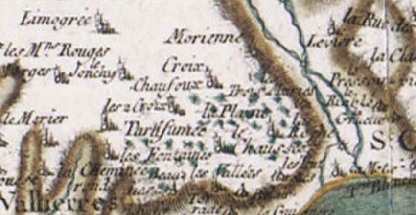 site de La Plaine ; extrait carte de Cassini. Communes Fondettes -Vallières